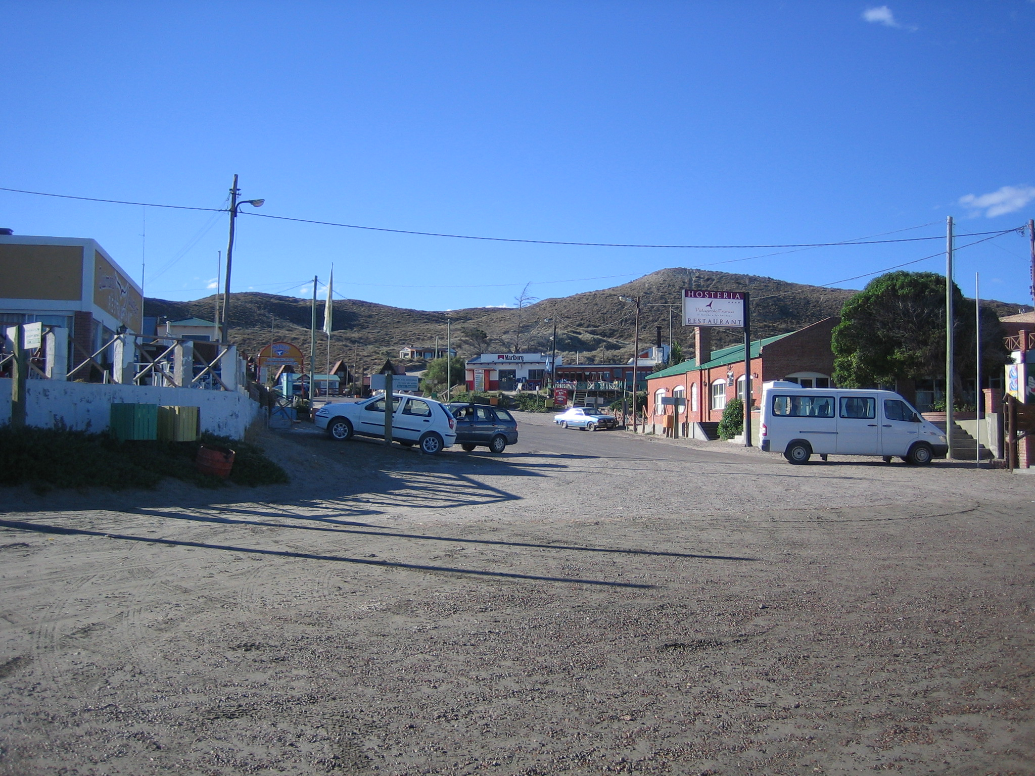 Von mir selbst aufgenommen und unter Public Domain gestellt.